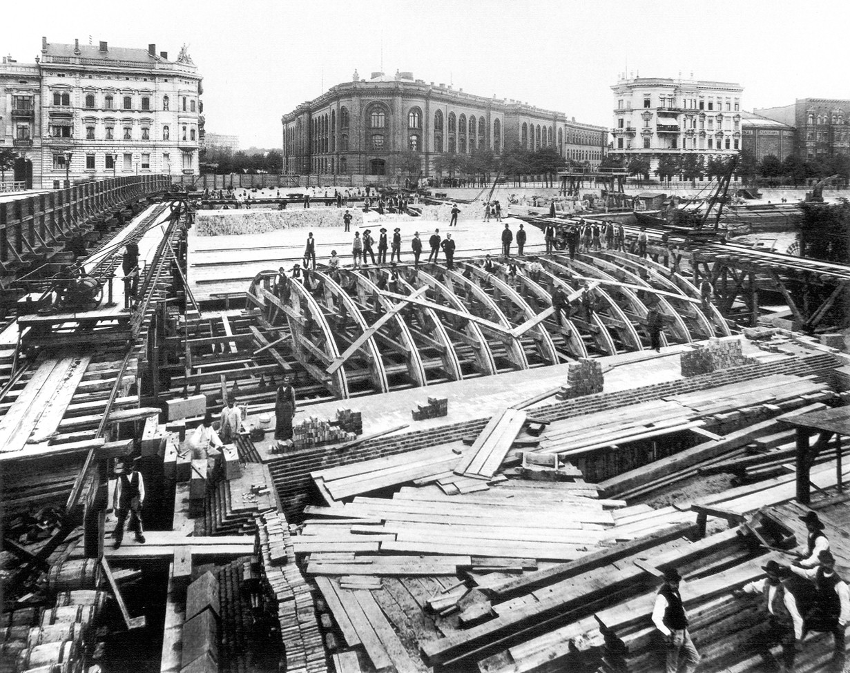 Bau der Moltkebrücke, Berlin